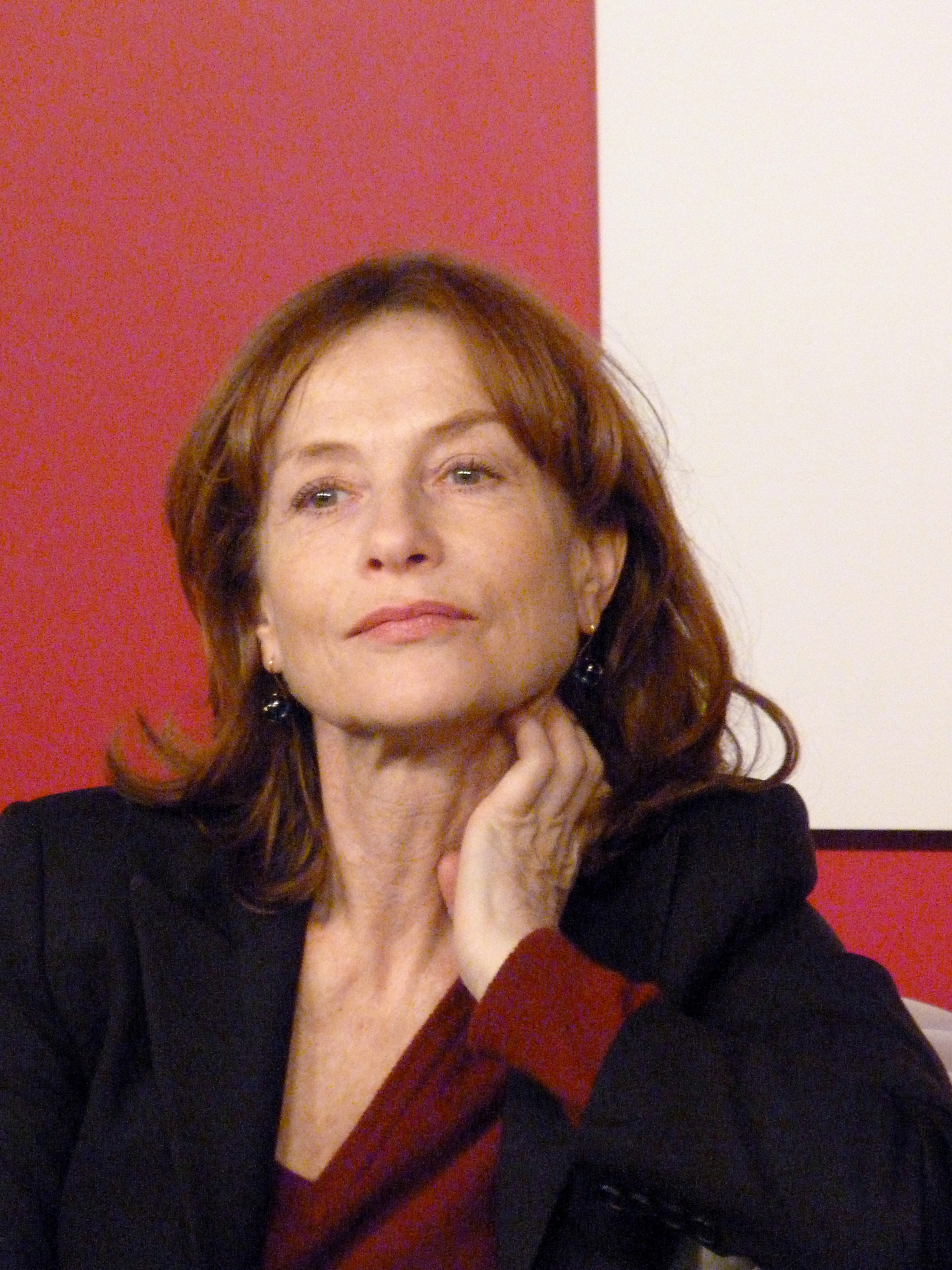 Isabelle Huppert, lors de la présentation du DVD du film Copacabana de Marc Fitoussi, le 27 novembre 2010 à la FNAC Montparnasse.